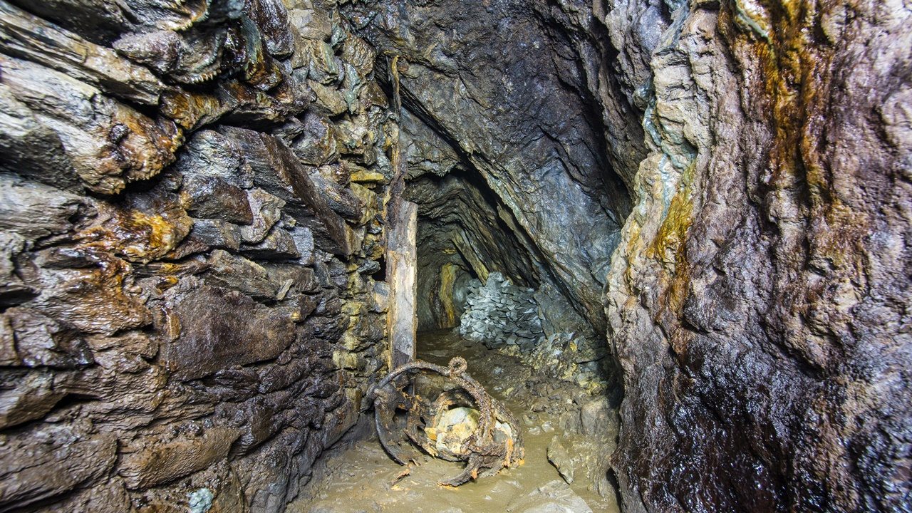 Abbau Apfelbaum